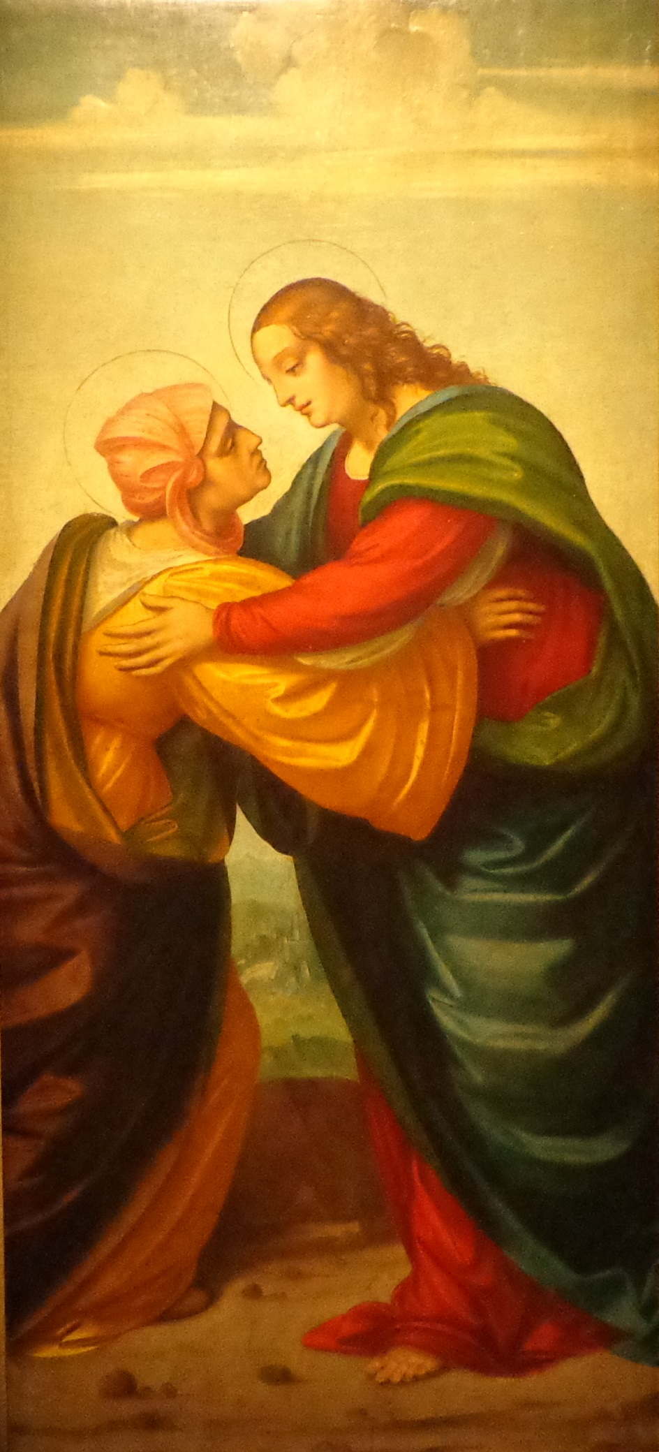 La Visitation, début du 16ème siècle